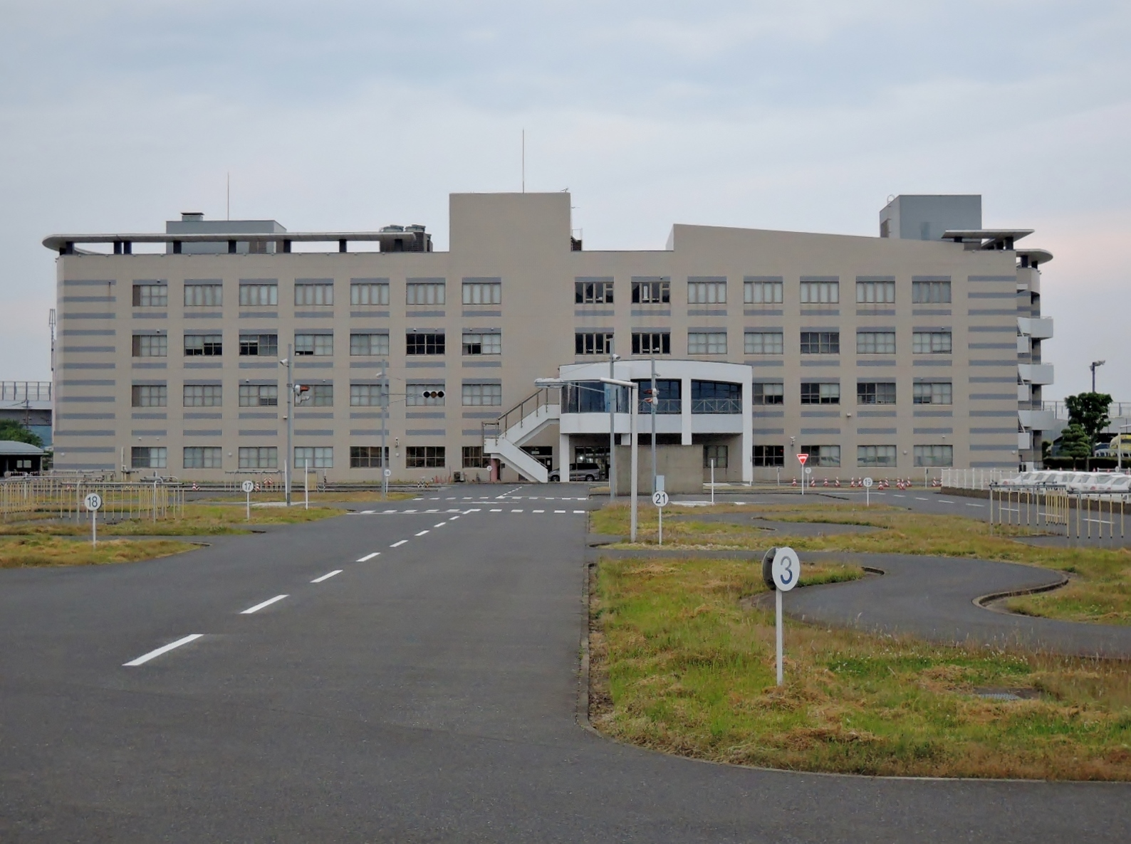 福岡自動車運転免許試験場